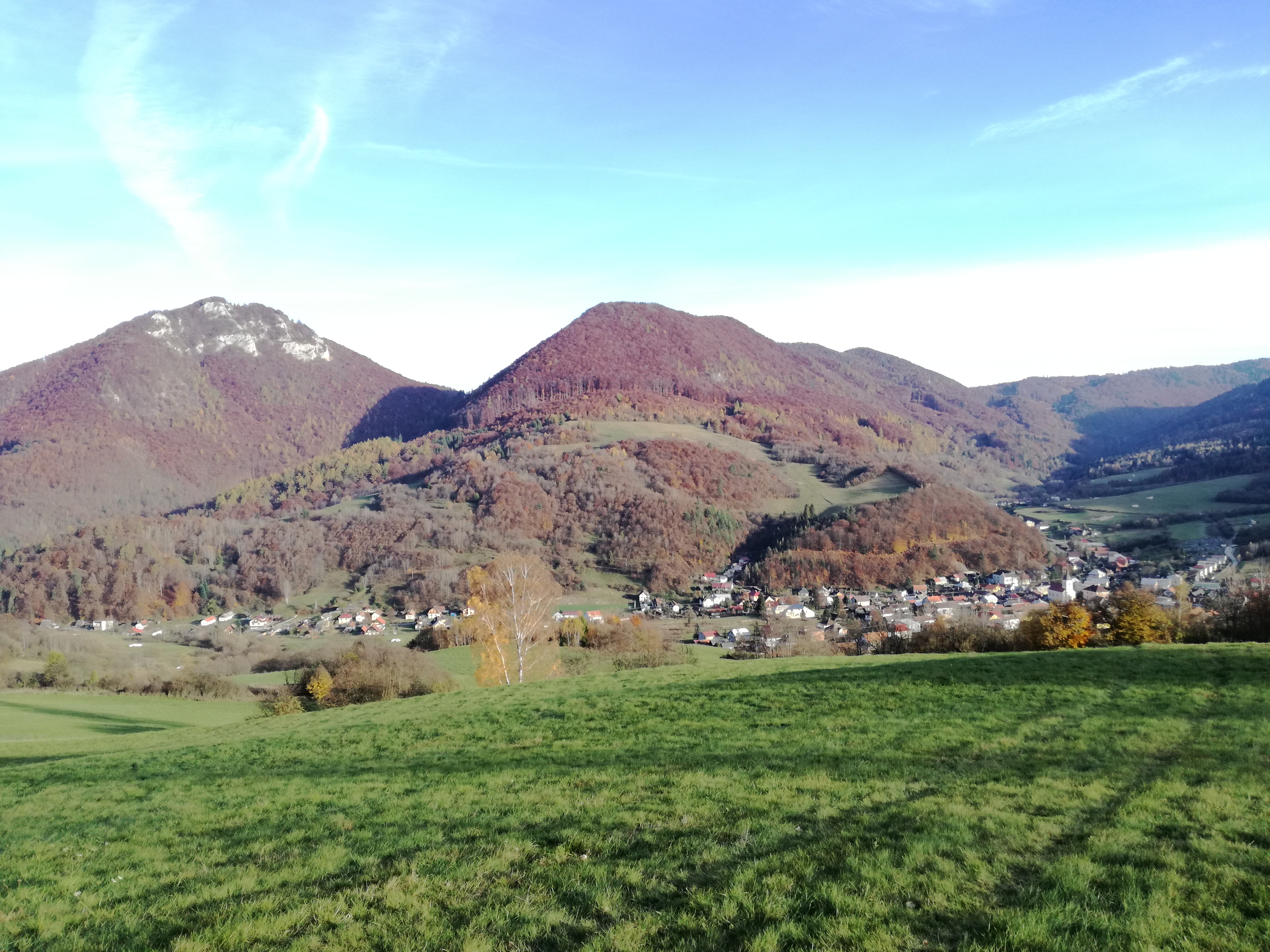 Pohľad na obec Kojšov, ktorá je situovaná na východe Slovenska.